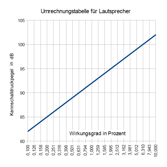 Logarithmische Umrechnung Kennschalldruckpegel Wirkungsgrad